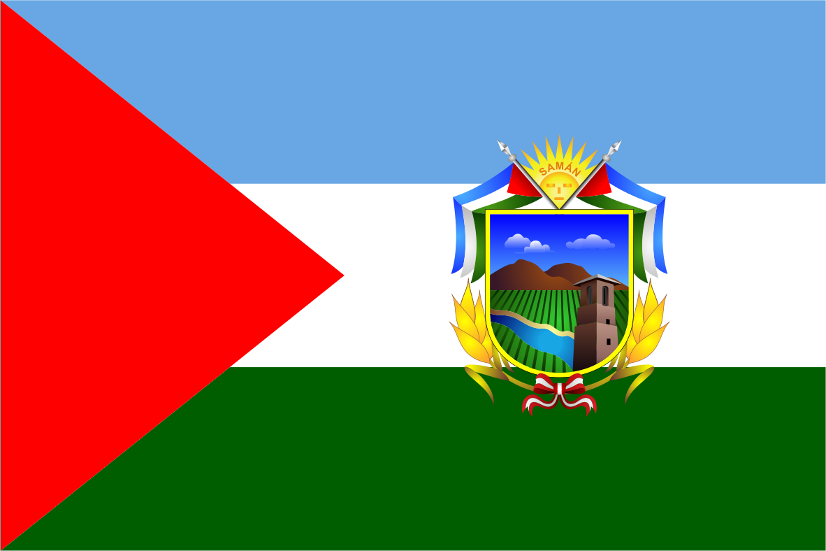 Distrito de Samán - Provincia de Azángaro - Región Puno